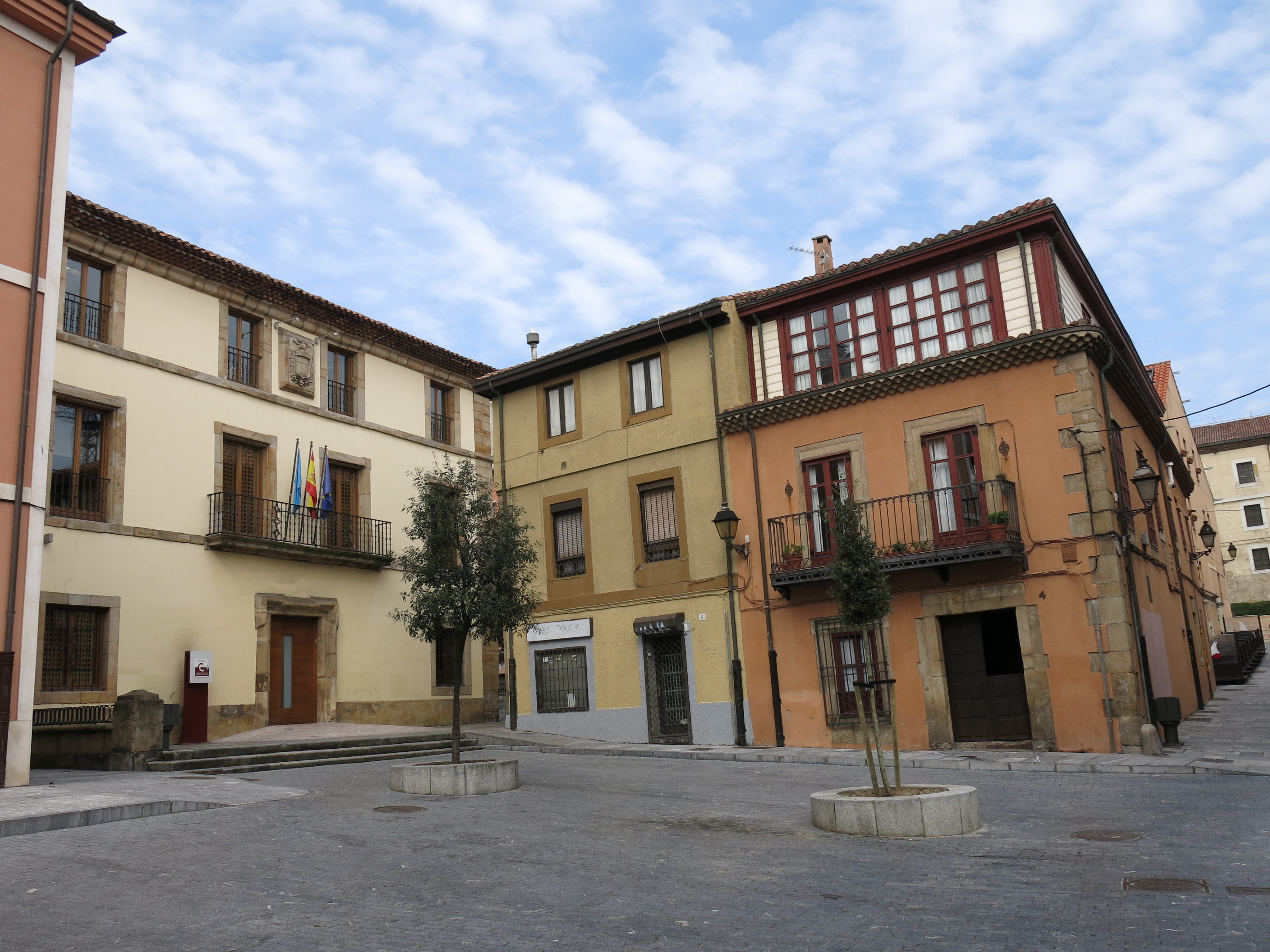 Conjunto Histórico Artístico El Barrio Viejo de Gijón